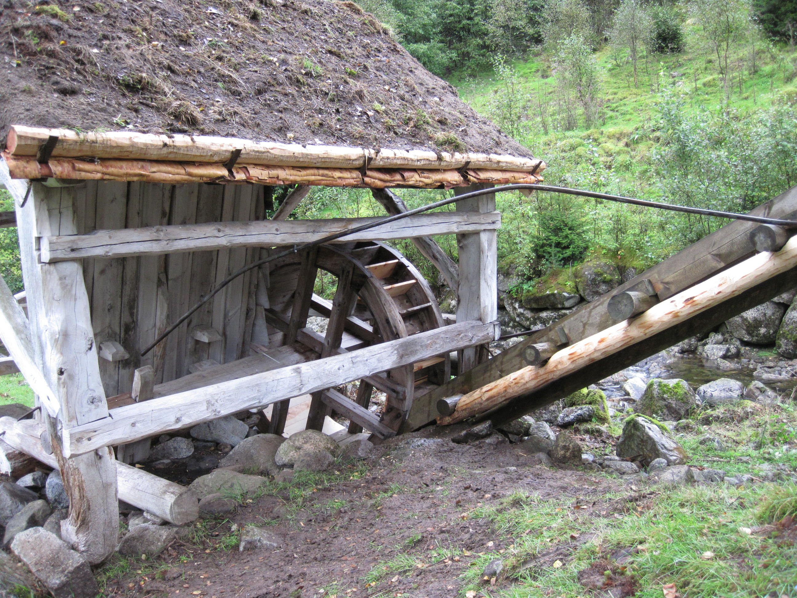 Norsk (nynorsk): Klesstampa på Kvæstad i Suldal er ei avdeling av Ryfylkemuseet.